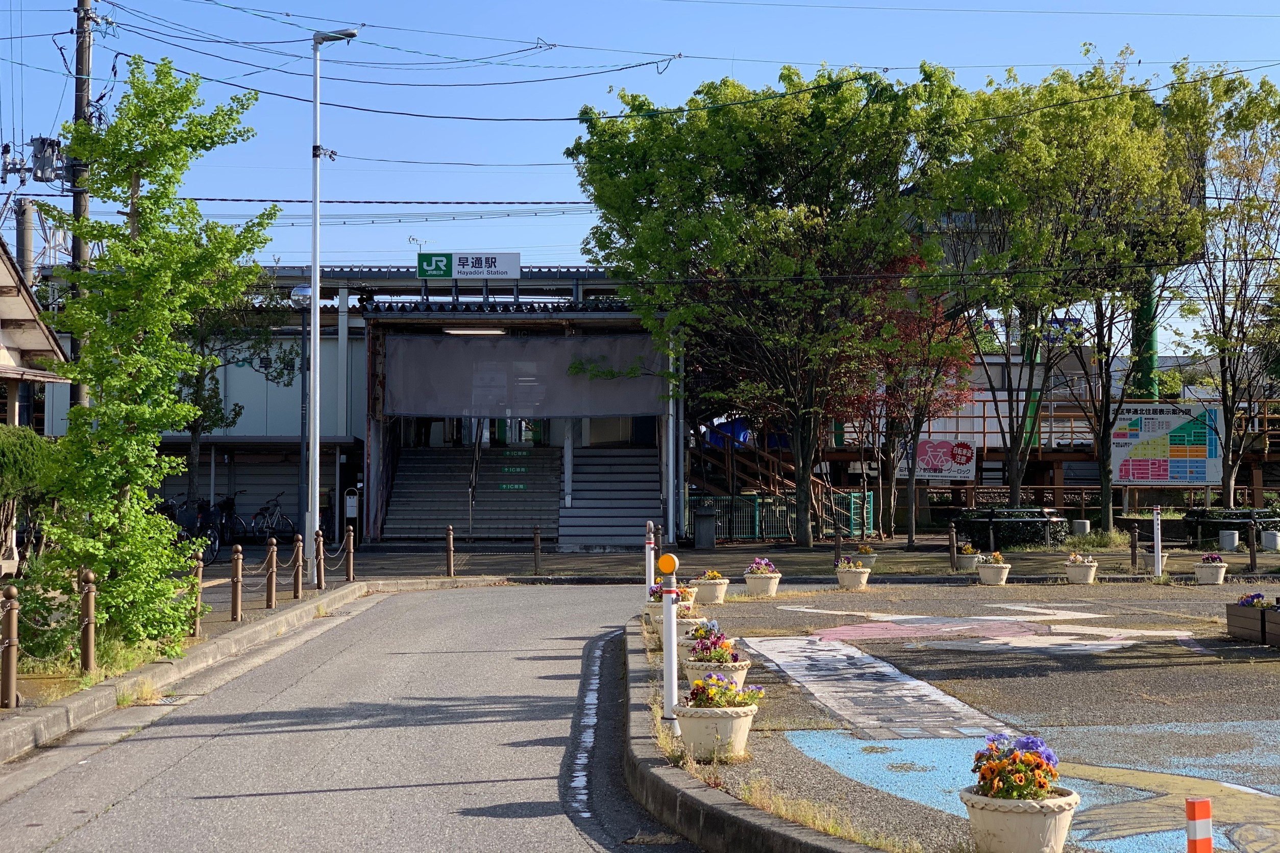 JR白新線早通駅の北口駅舎（2020年5月）